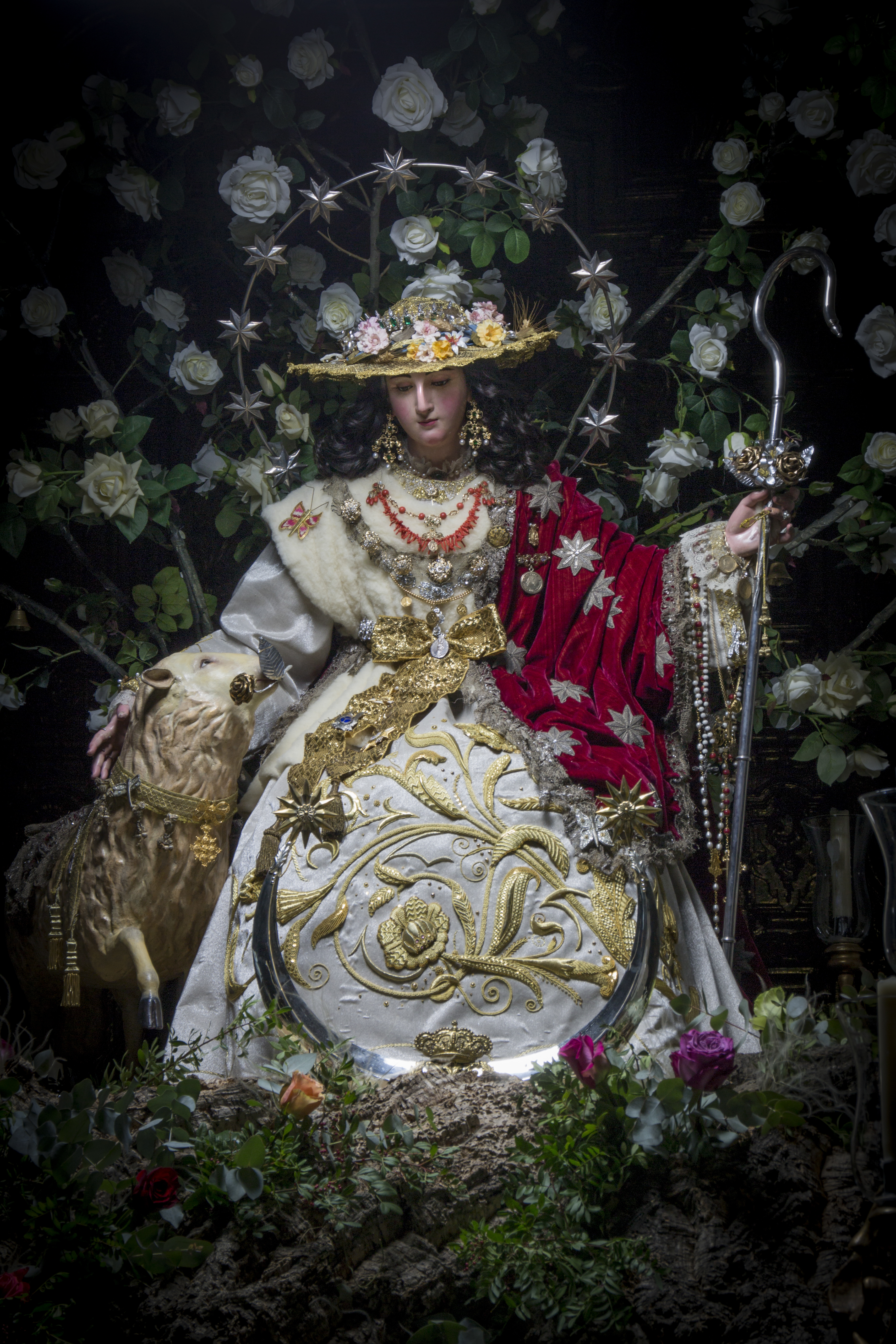 Imagen de la Divina Pastora que se encuentra en la Parroquia Matriz de San Juan, Marchena (Sevilla). Se trata de una imagen anónima de finales del s. XVIII, si bien algunos historiadores la asemejan a la obra de Juan de Astorga.